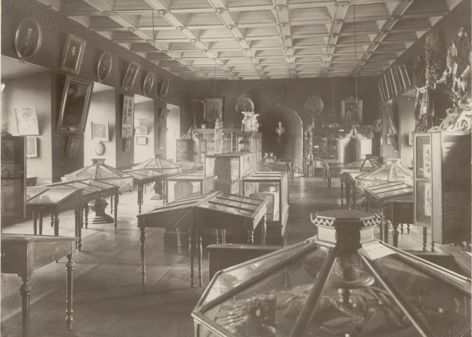 Museum of Antiquities in Vilnius